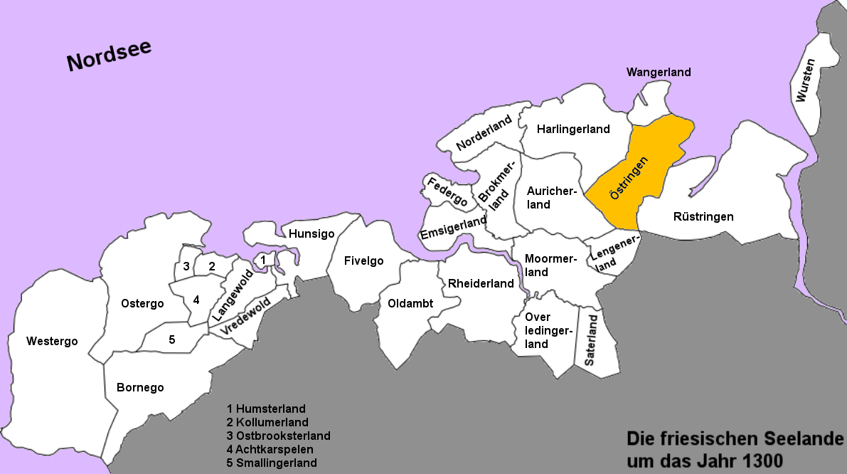 Karte der freien friesischen Seelande (Landesgemeinden) von der Zuiderzee bis zur Weser in den Grenzen um das Jahr 1300. Östringen hervorgehoben. (Karte ohne Inseln.)